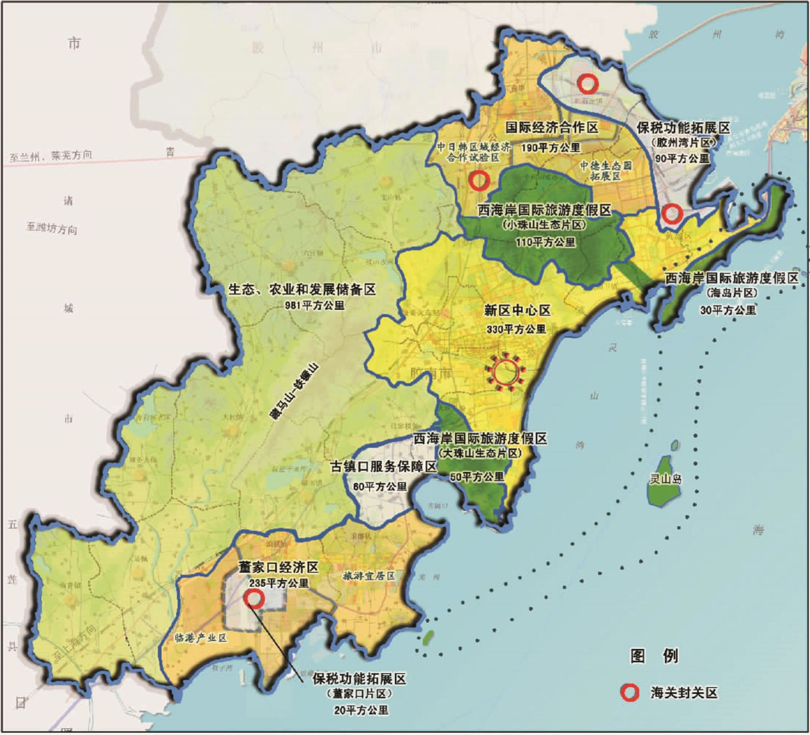 青岛西海岸经济新区空间布局示意图